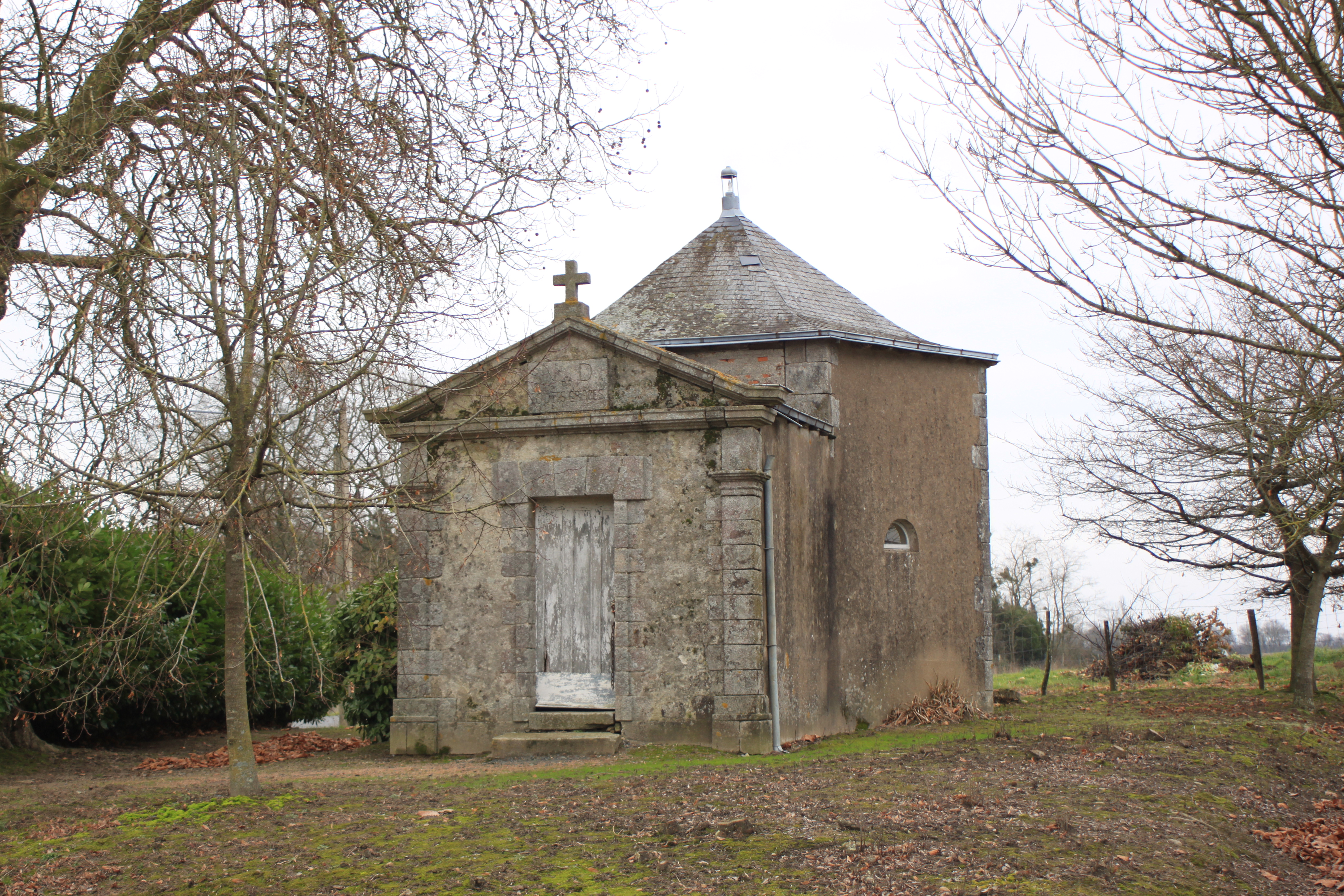 Chapelle Notre-Dame-de-Grâce, la Tulévrière, Fr-49-Montfaucon-Montigné.